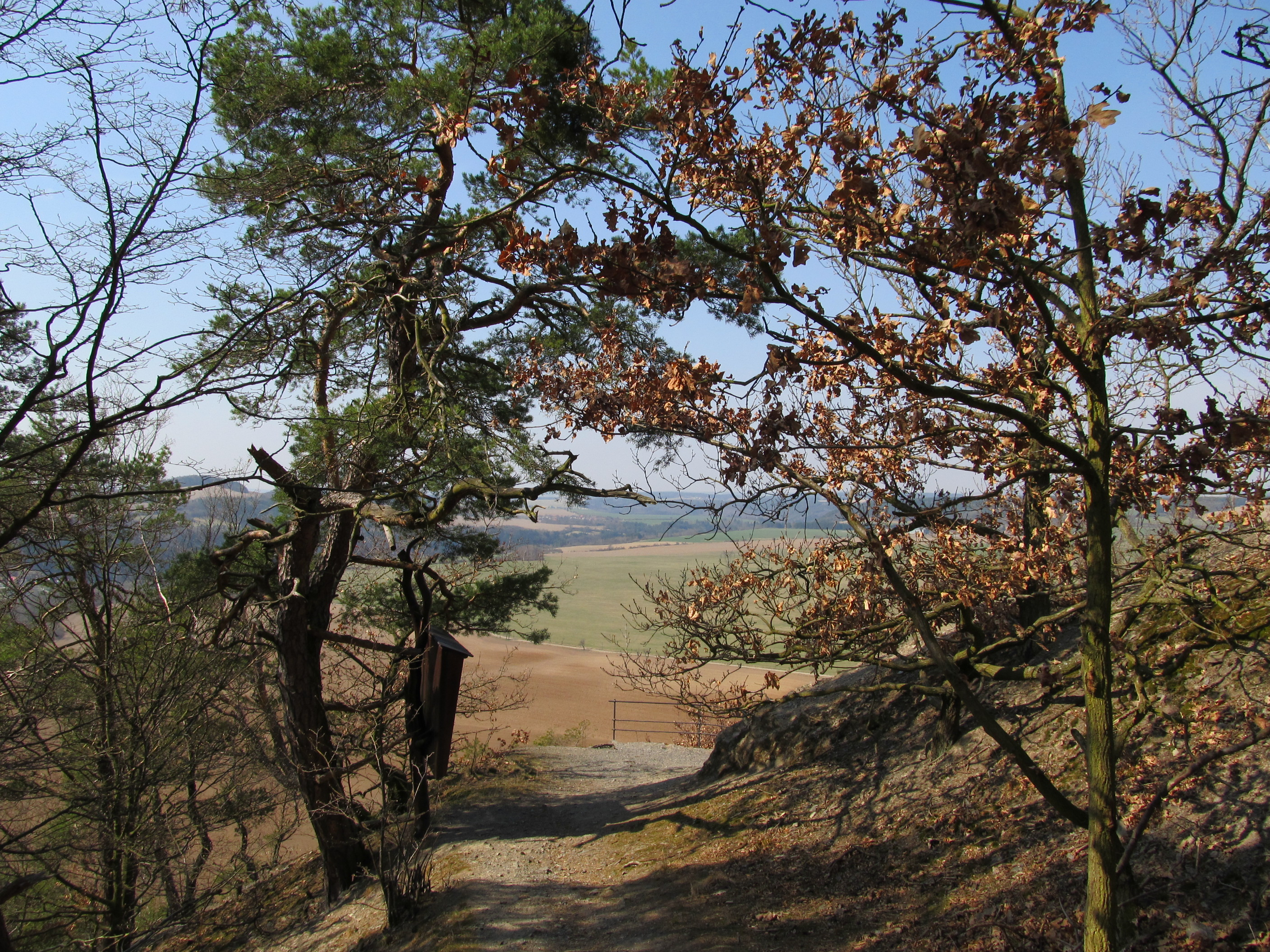 Chlum - vyhlídka Na Plazu